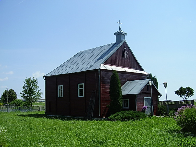 Сейлавічы. Касцёл Сэрца Ісуса